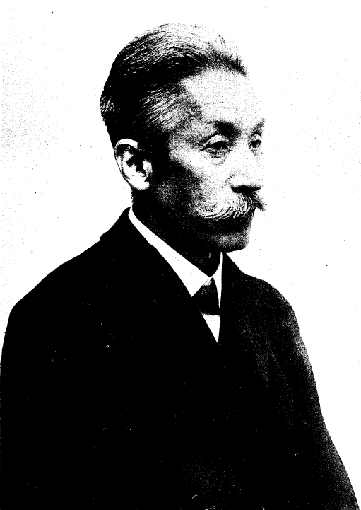 医学博士島邨俊一先生